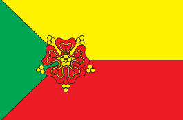 Прапор Розівського району